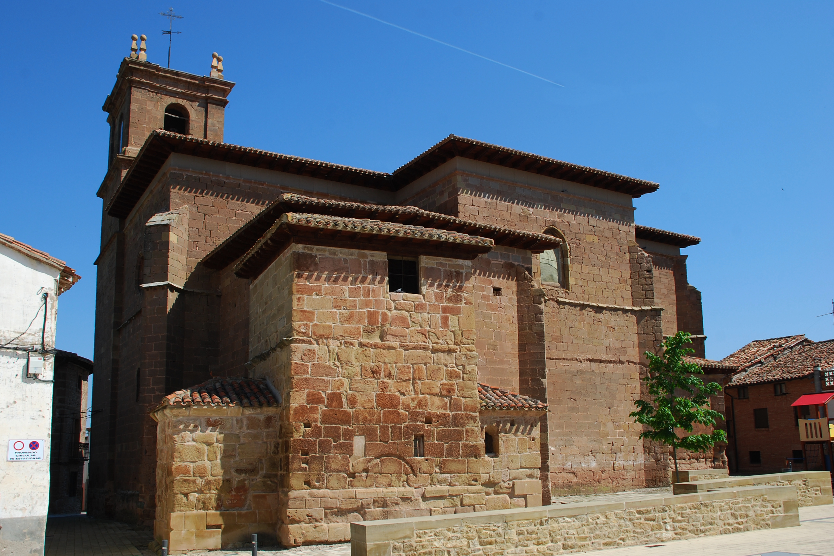 Iglesia de la Asunción en Santa Coloma, La Rioja - España.